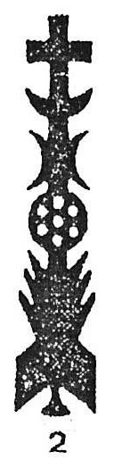 Twents Gevelteken